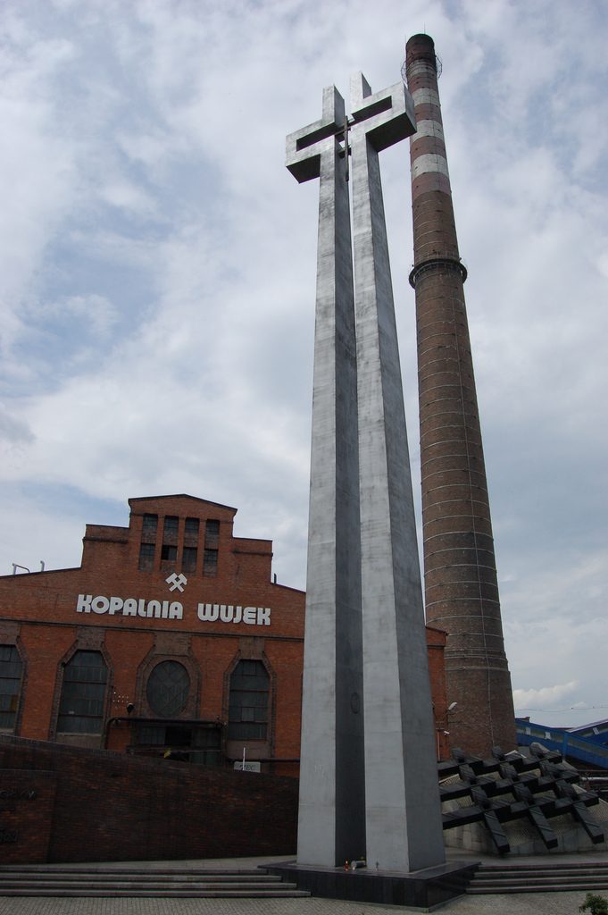 Krzyż upamiętniający 9 górników poległych podczas pacyfikacji KWK Wujek w 1981